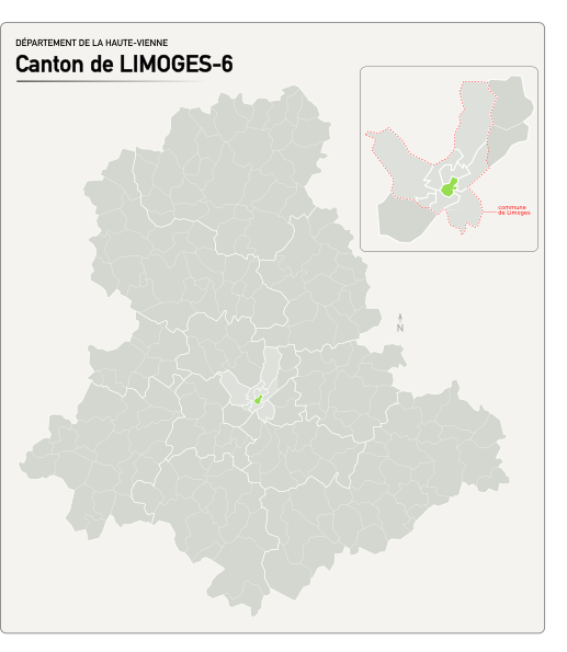 Carte du nouveau canton de Limoges-6.